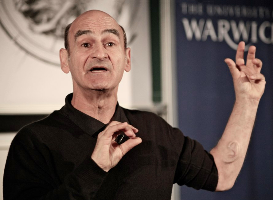 Stelarc at VirtualFutures